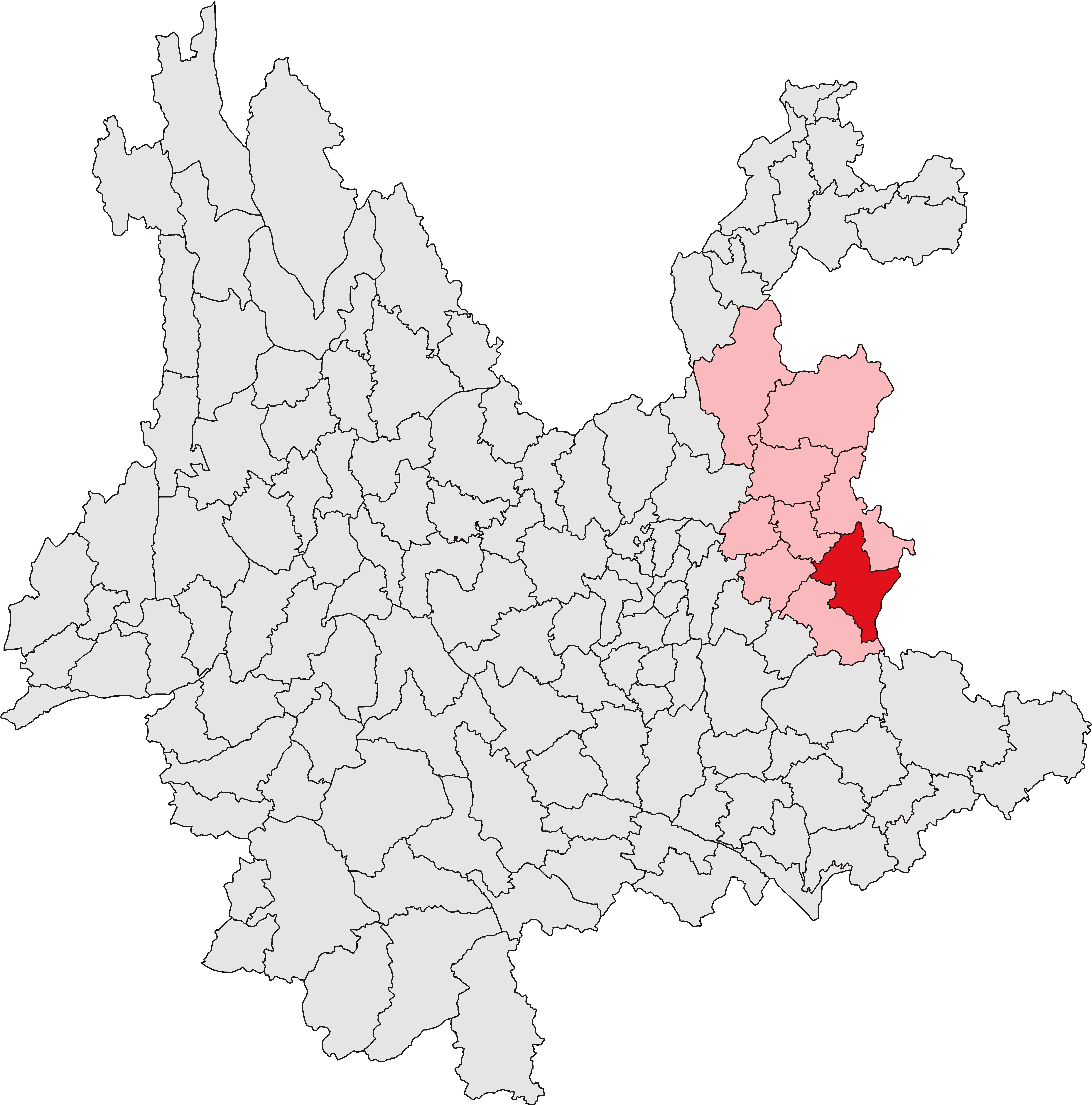 罗平县位置图